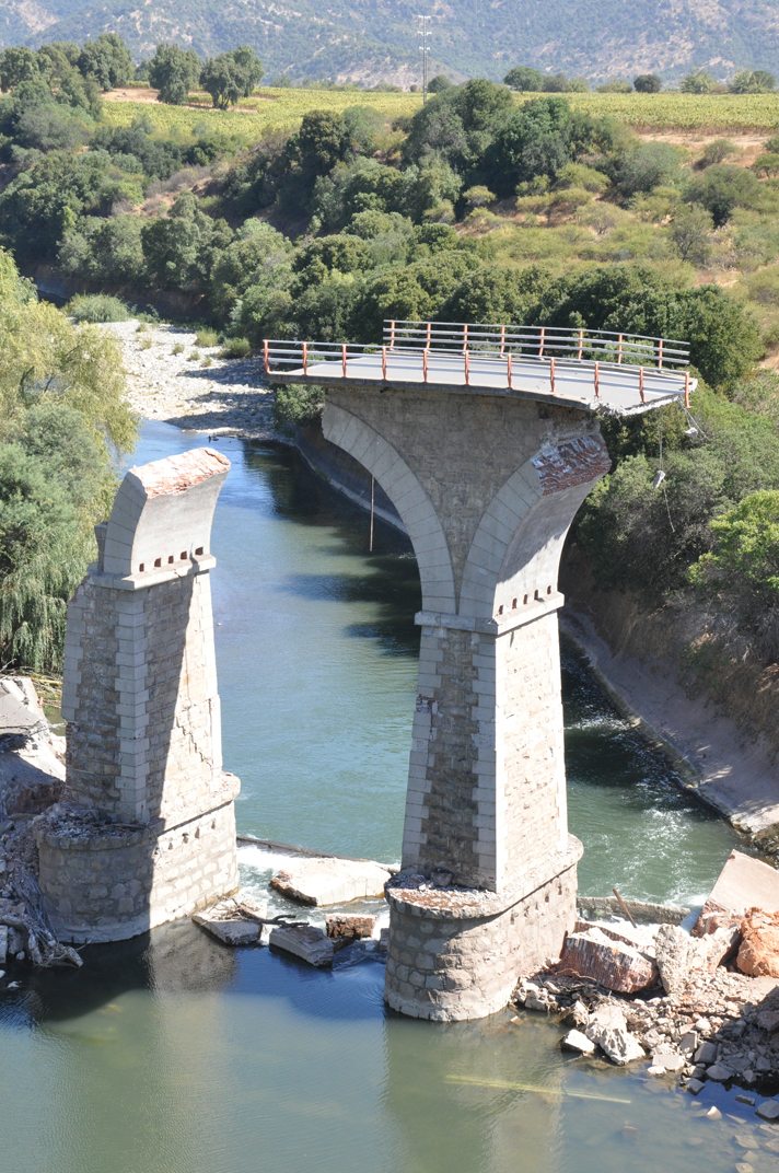 Puente talca, Chile